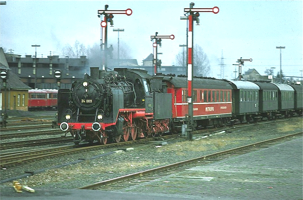 Dampflokomotive der Baureihe 24 im Bahnhof Mayen Ost (Museumsfahrt); Hersteller: Schichau Werke (Elbing), Baujahr: 1928, Fabriknummer: 3124